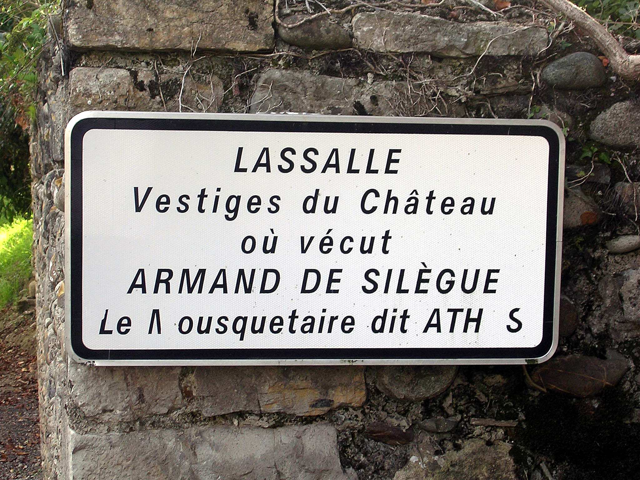 Vestiges du château d'Athos-Aspis, demeure du mousquetaire Athos.